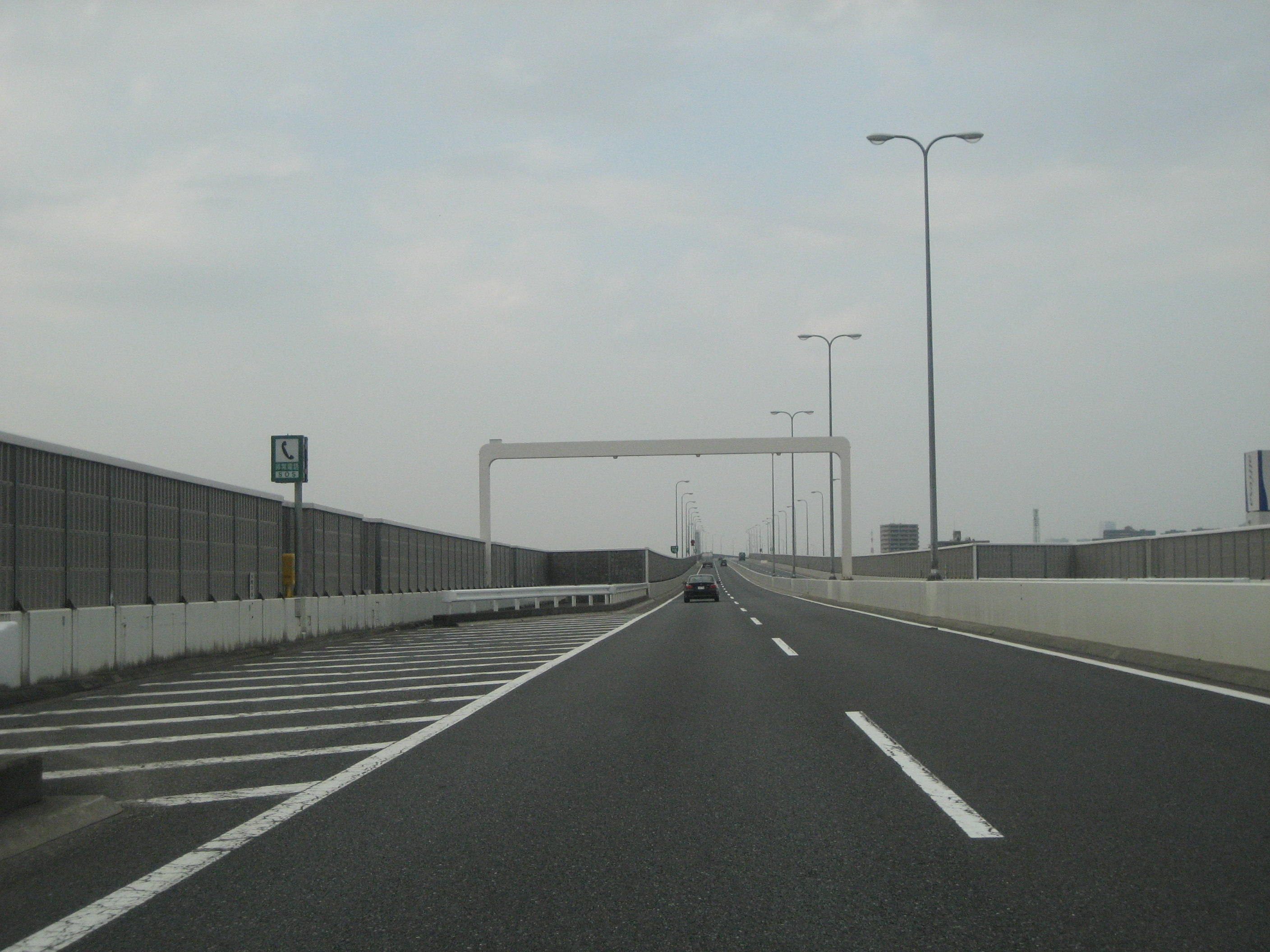 首都高速埼玉大宮線浦和中央出口（予定地）付近